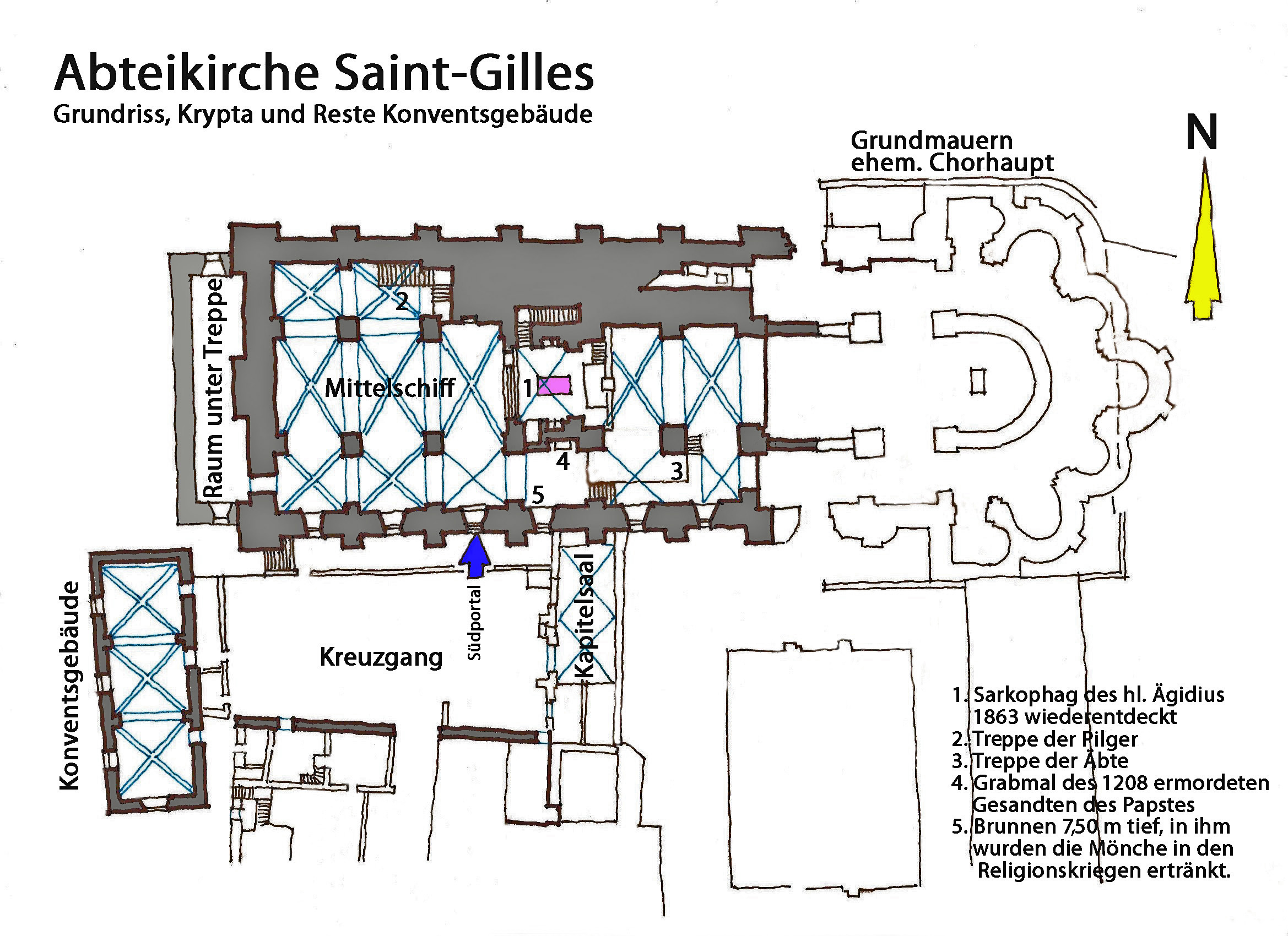 Abteikirche St-Gilles Grundriss Krypta u. Reste_Konventsgebäude.